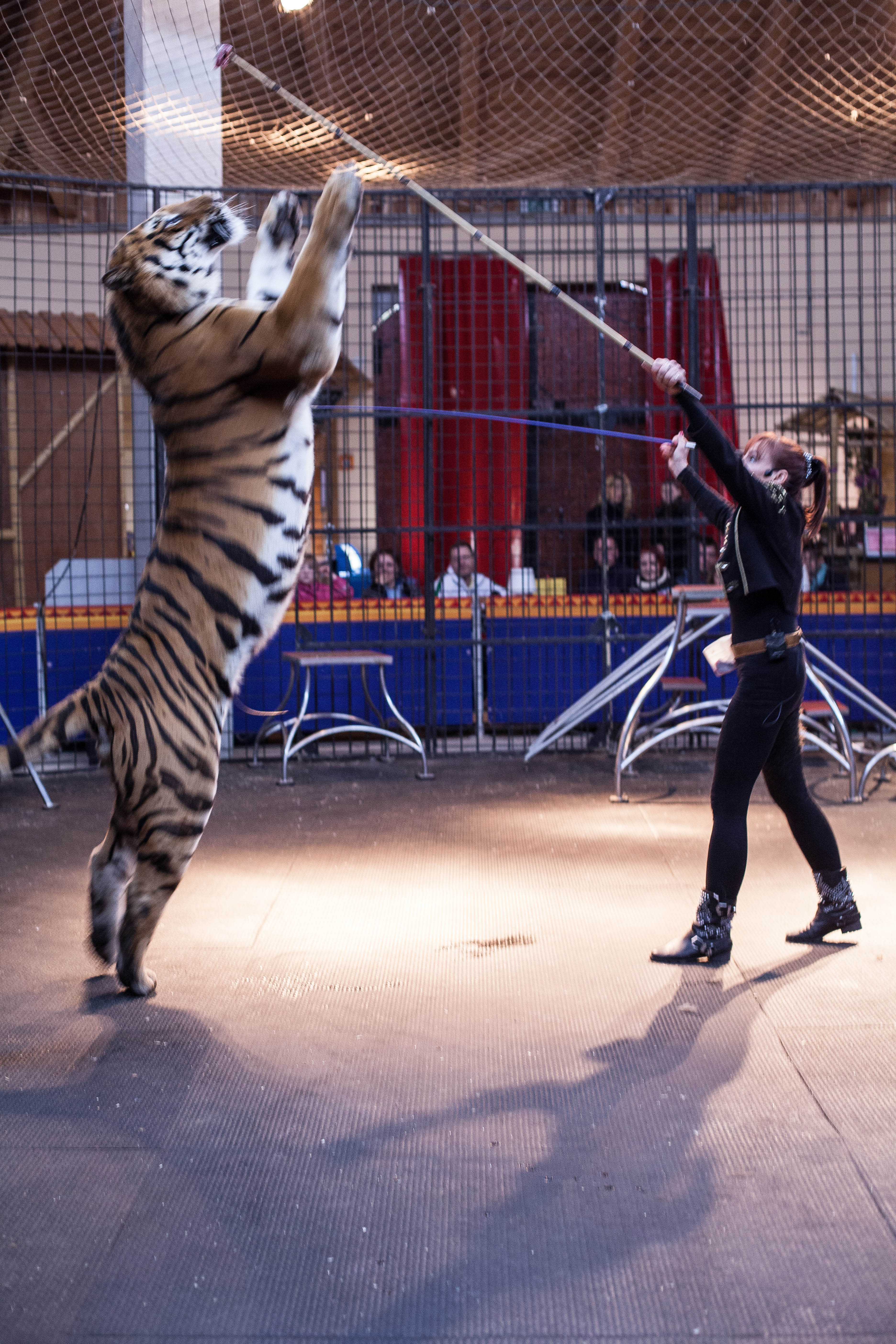 Königstiger Korfu mit Trainerin Monica Farell